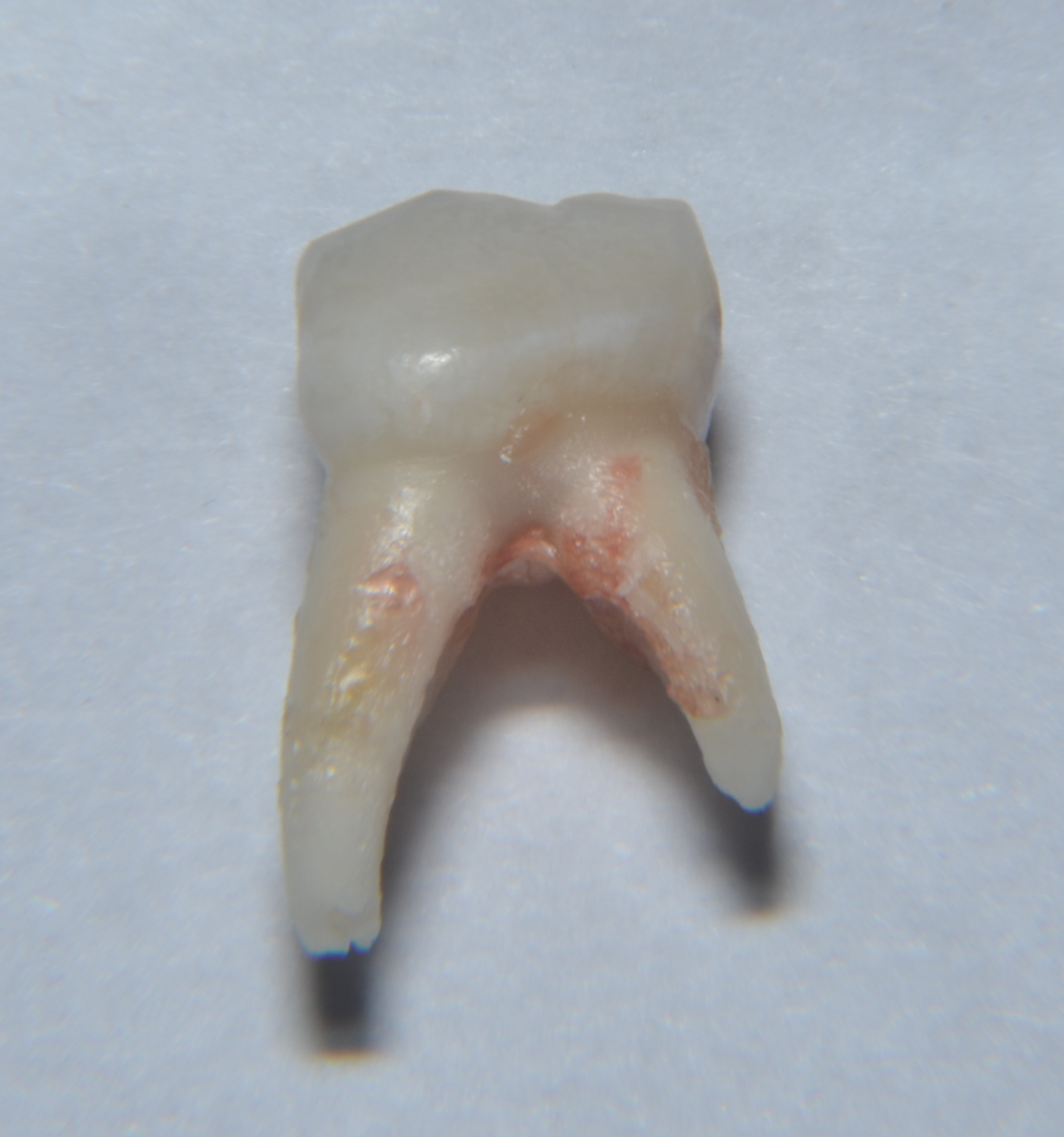 Молочный четвертый нижний зуб удален у 6-ти летней девочки из-за глубокого кариеса.